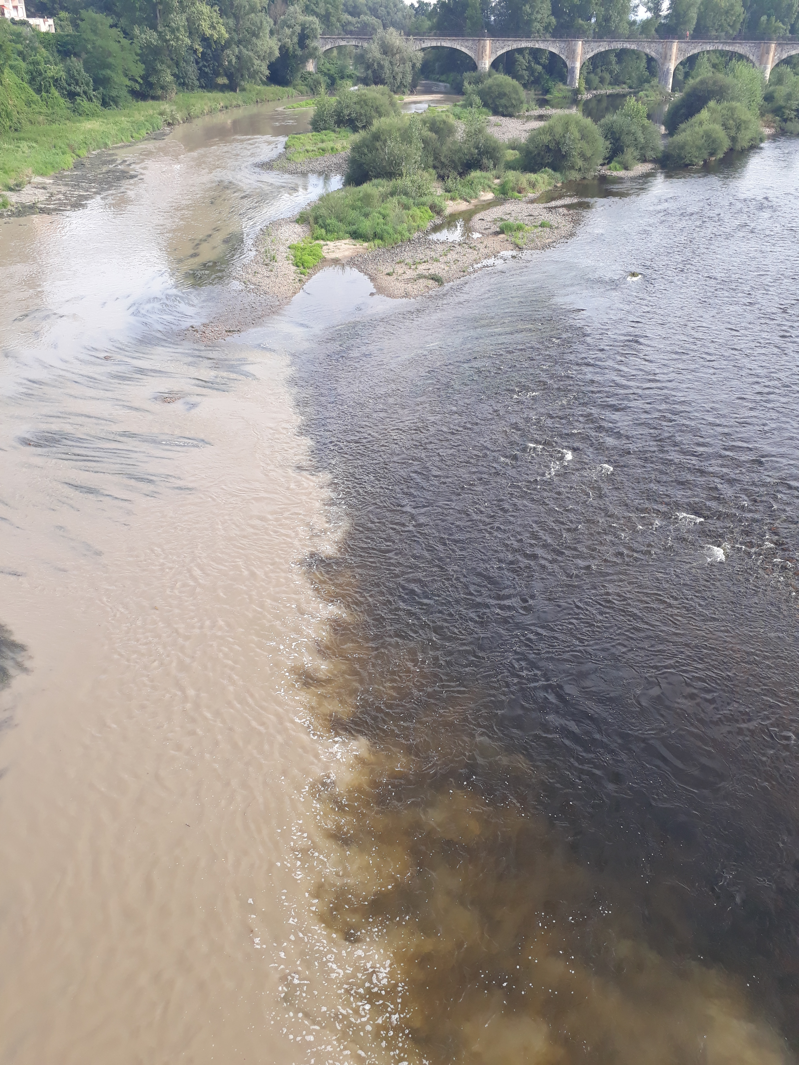 Confluence de la Loire et de la Coise à Montrond-les-Bains, par temps orageux. Sur la gauche de la photo la Coise est chargée en limon de part les orages.